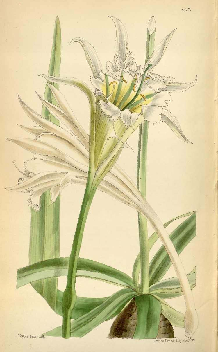 Leptochiton quitoensis